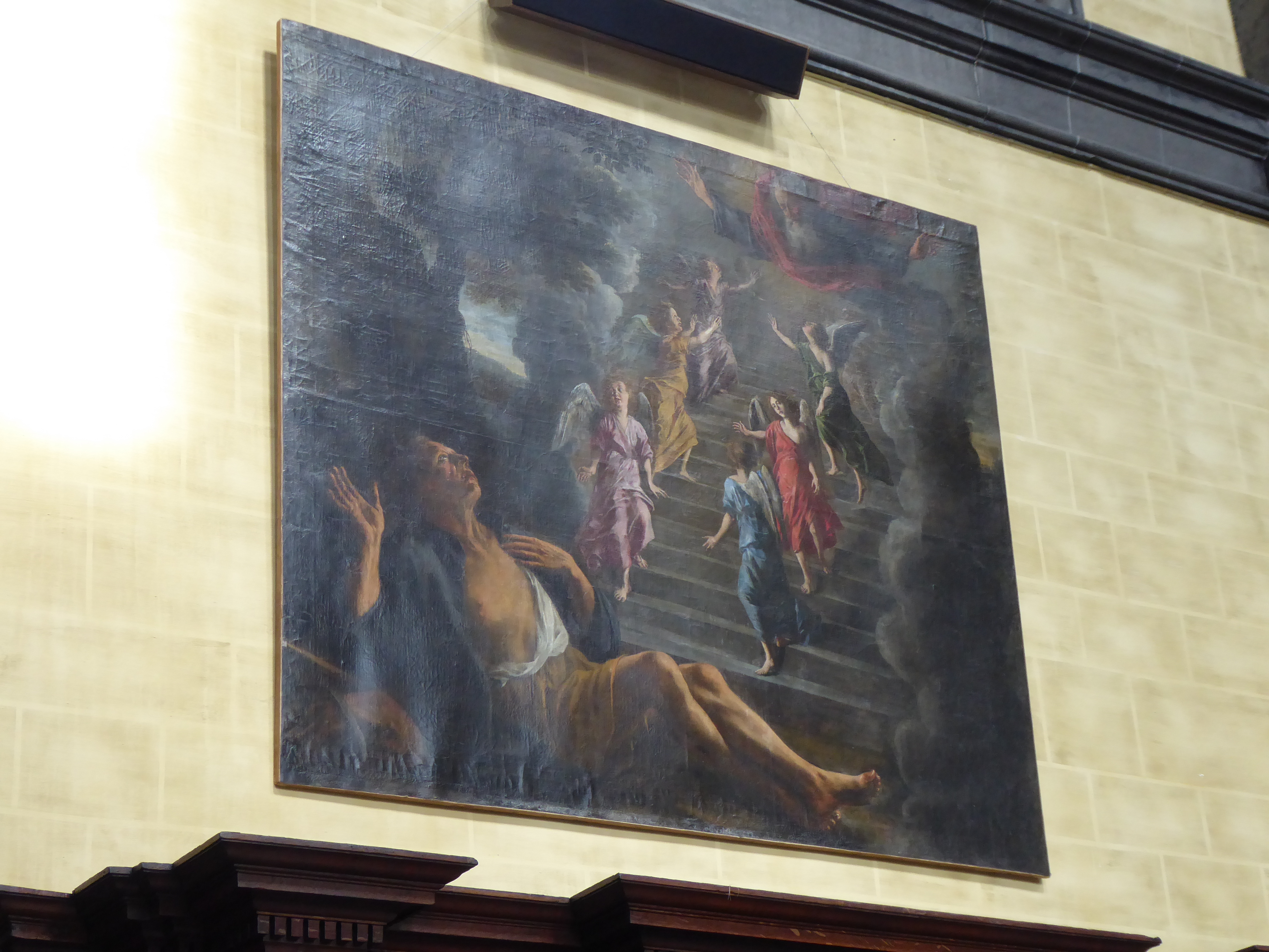 Peinture du 18ème siècle réalisée par Jacques Nicolaï.